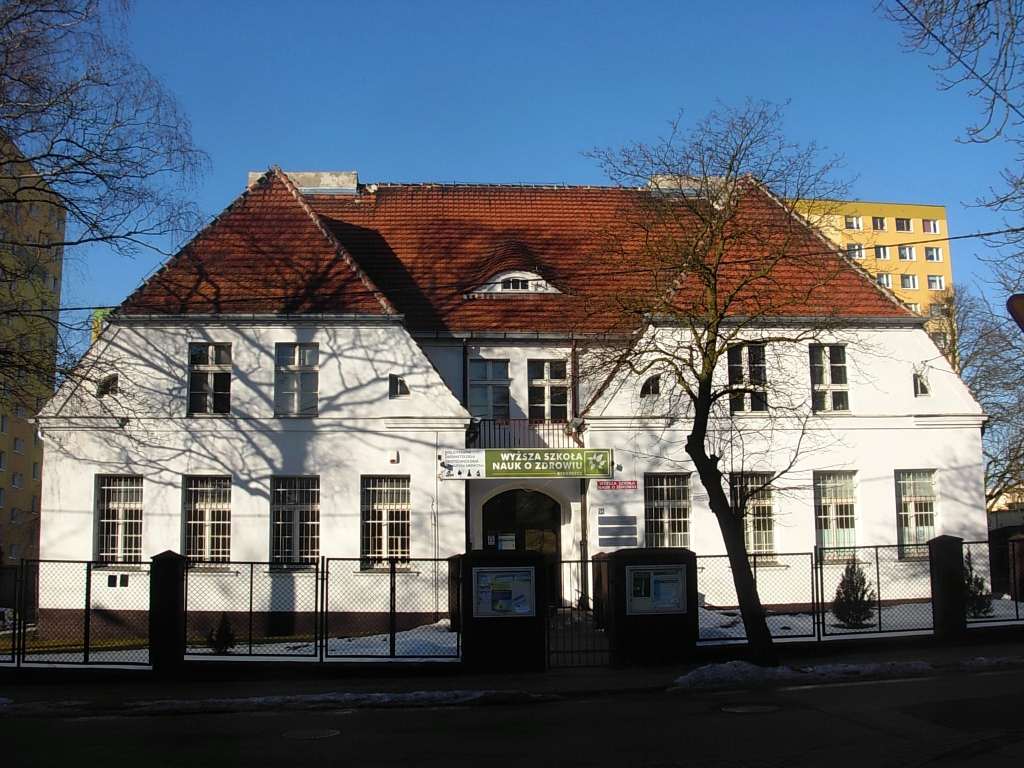 Budynek dawnej szkoły ludowej przy ul. Karpackiej na osiedlu Wzgórze Wolności w Bydgoszczy